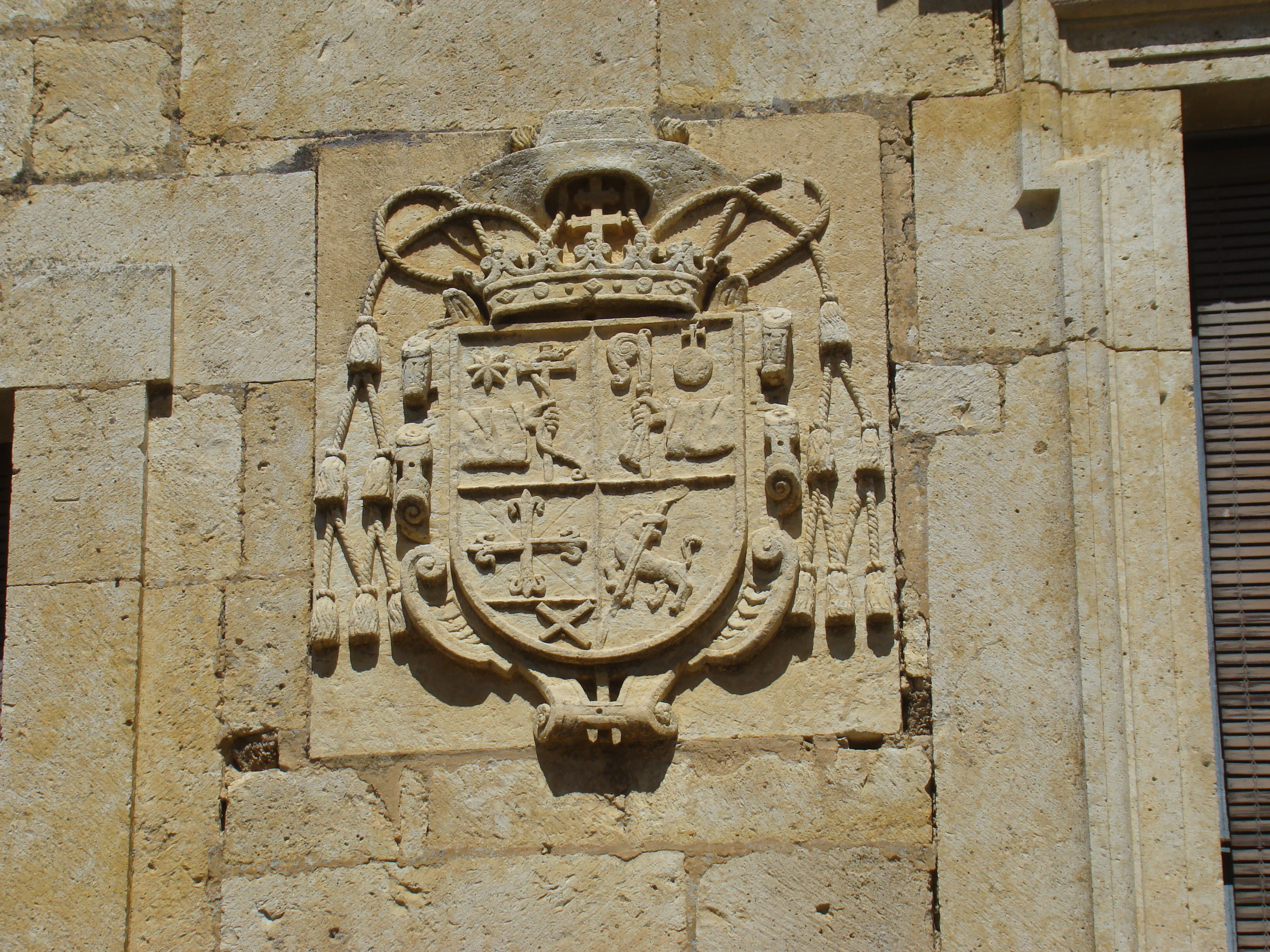 Támara de Campos (Palencia, España). Edificio del Priorato del monasterio benedictino de San Miguel. Detalle de un escudo.